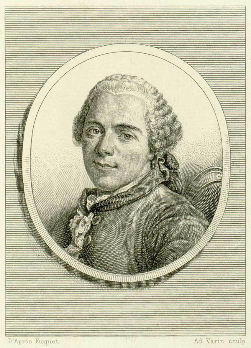 Portrait de Charles Eisen.